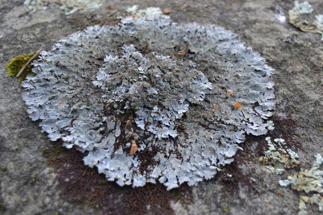 Lichen